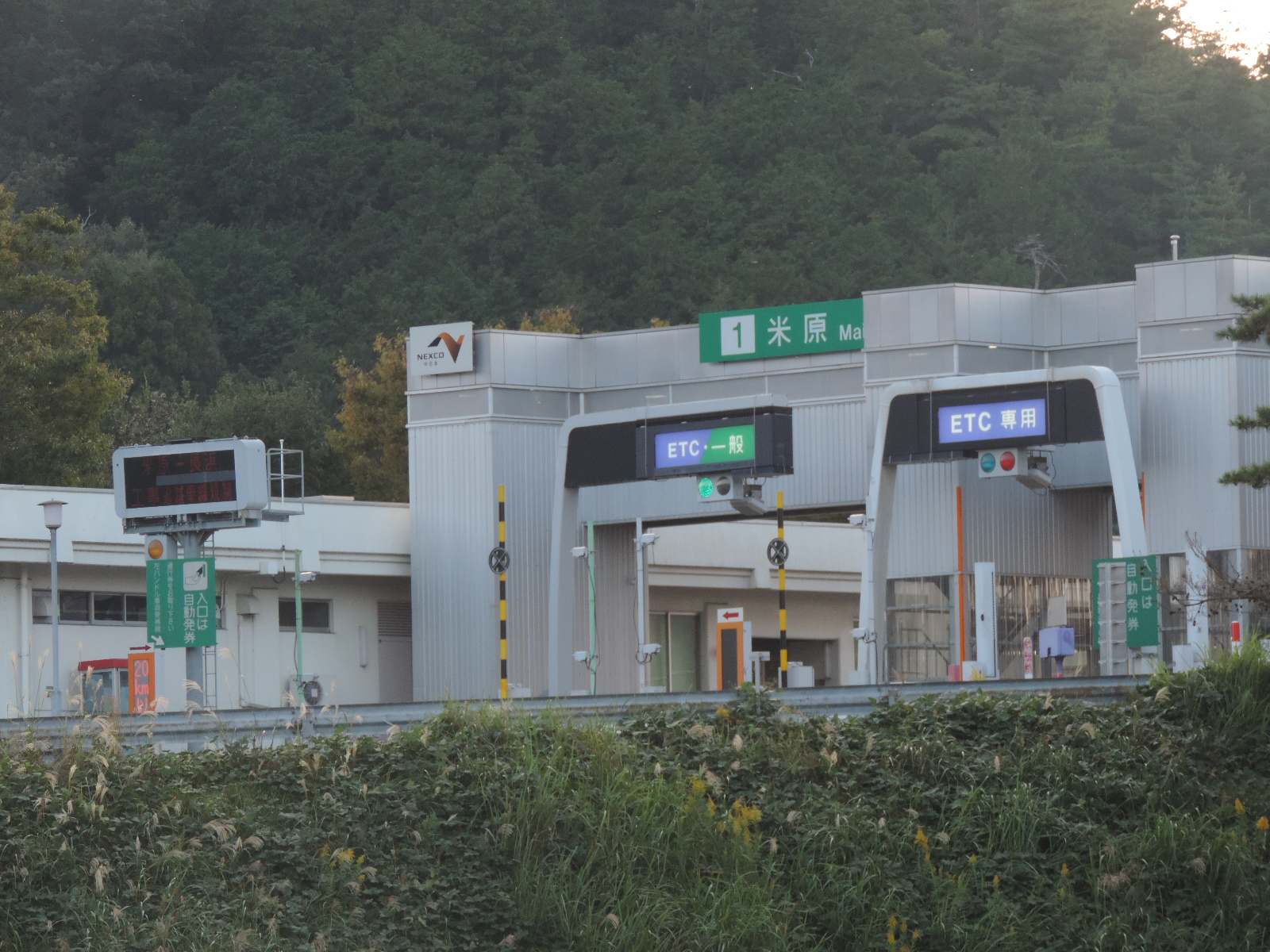 米原インターチェンジ料金所。2017年撮影